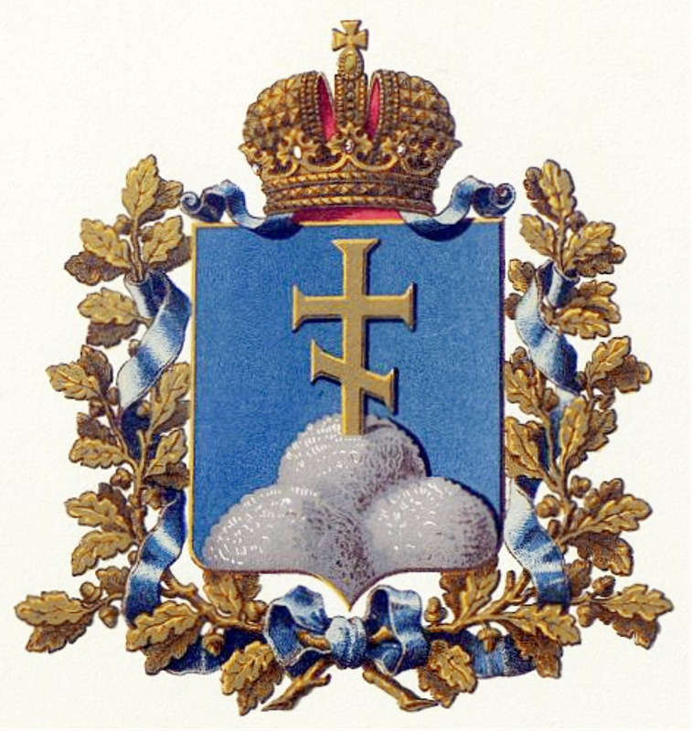 Official Russian Empire coat of arms Erivan Governorate. Герб Российской Империи Эриванской губернии в Гербовнике МВД. Утверждён Императором Всероссийским Александром Вторым в 1878 году.